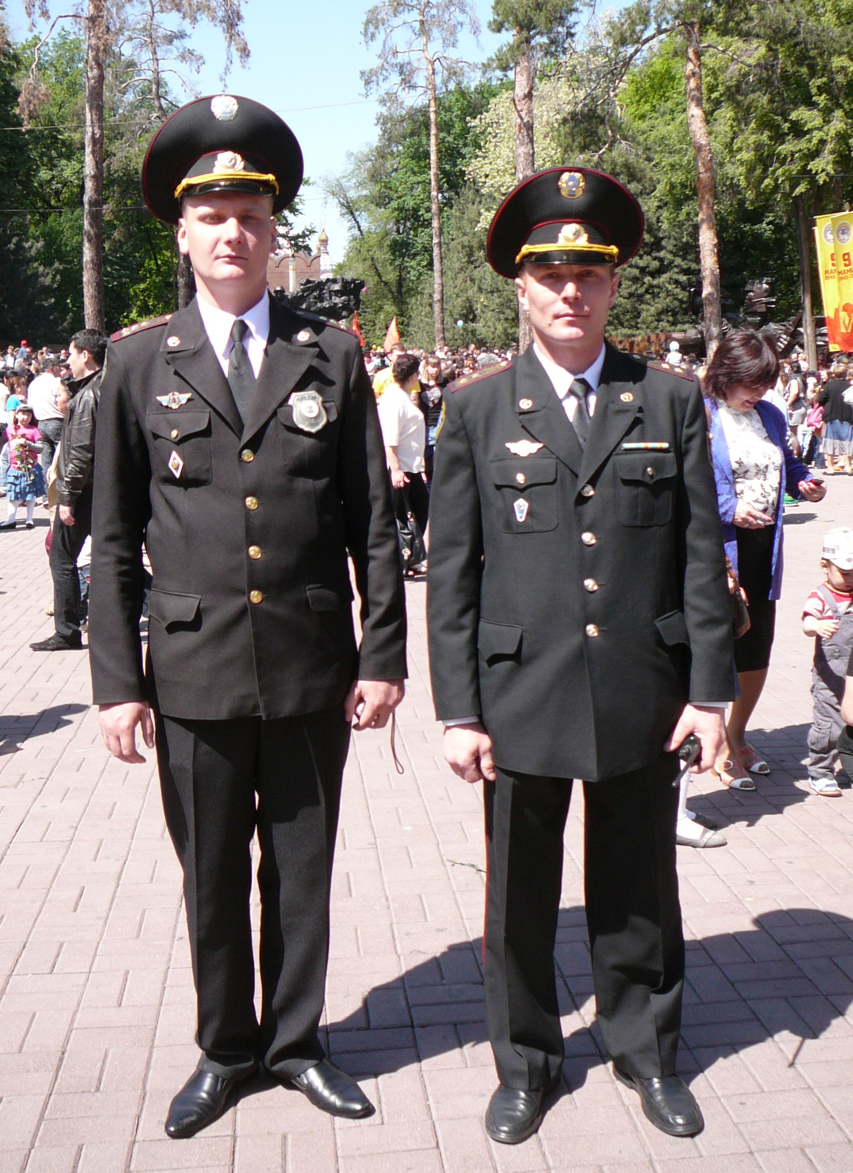 Офицеры военной полиции Казахстана в парадно-повседневной форме. Форма чёрного цвета. Алма-Ата. Парк имени 28-ми Панфиловцев. 9.05.2012